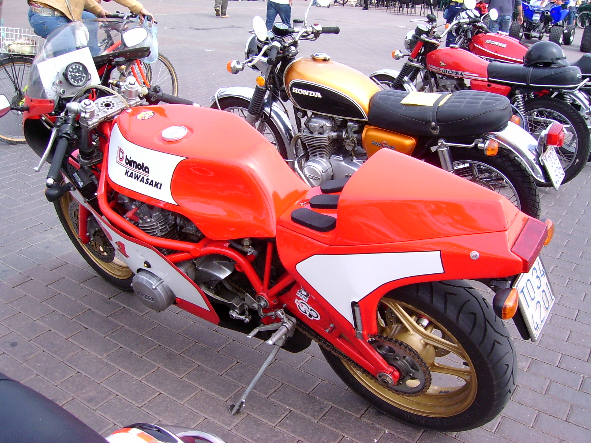 Bimota KB1 Foto scattata a Leinì per la festa del primo Maggio Leinì - Torino